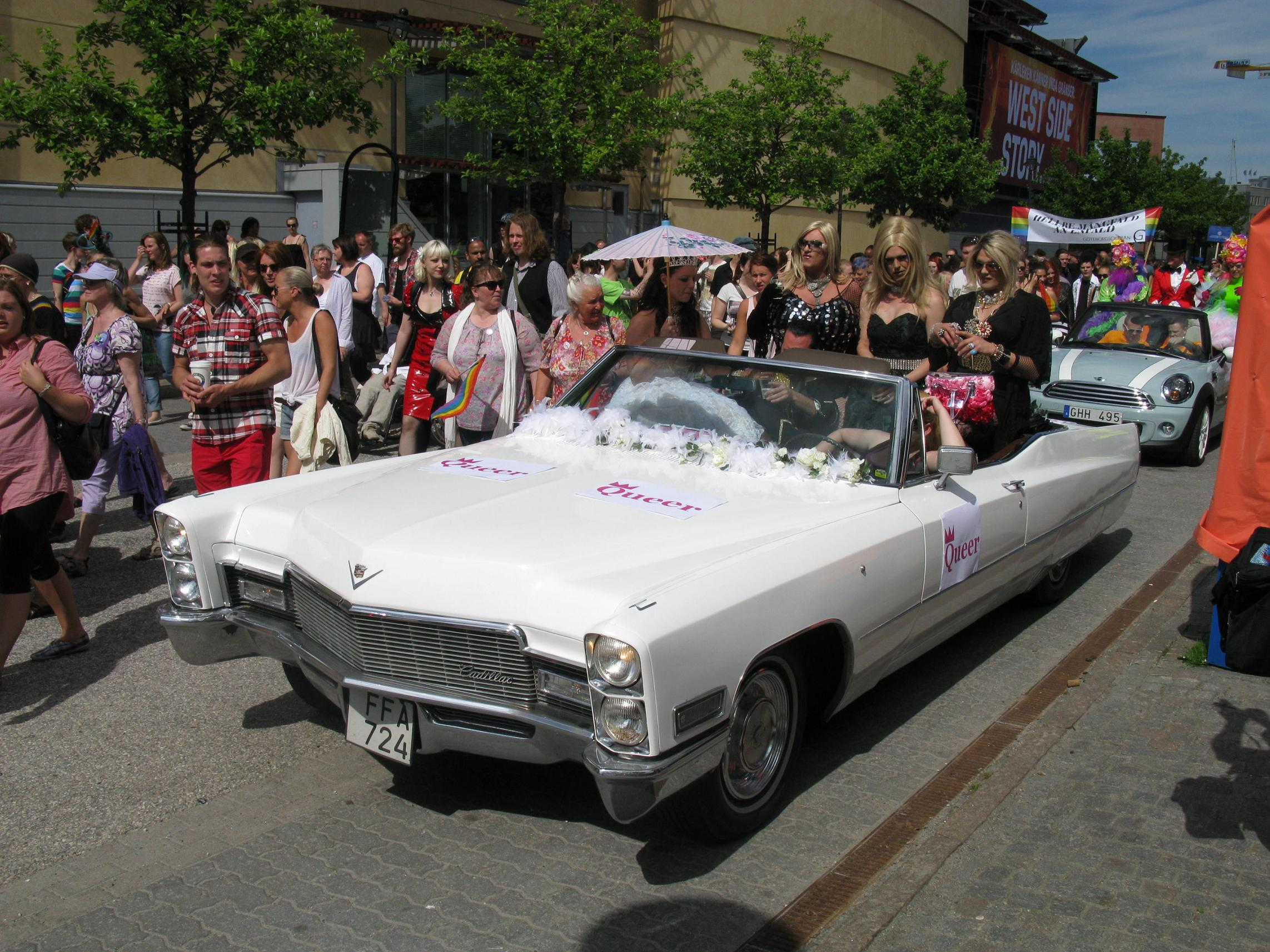 Cadillac De Ville Convertible